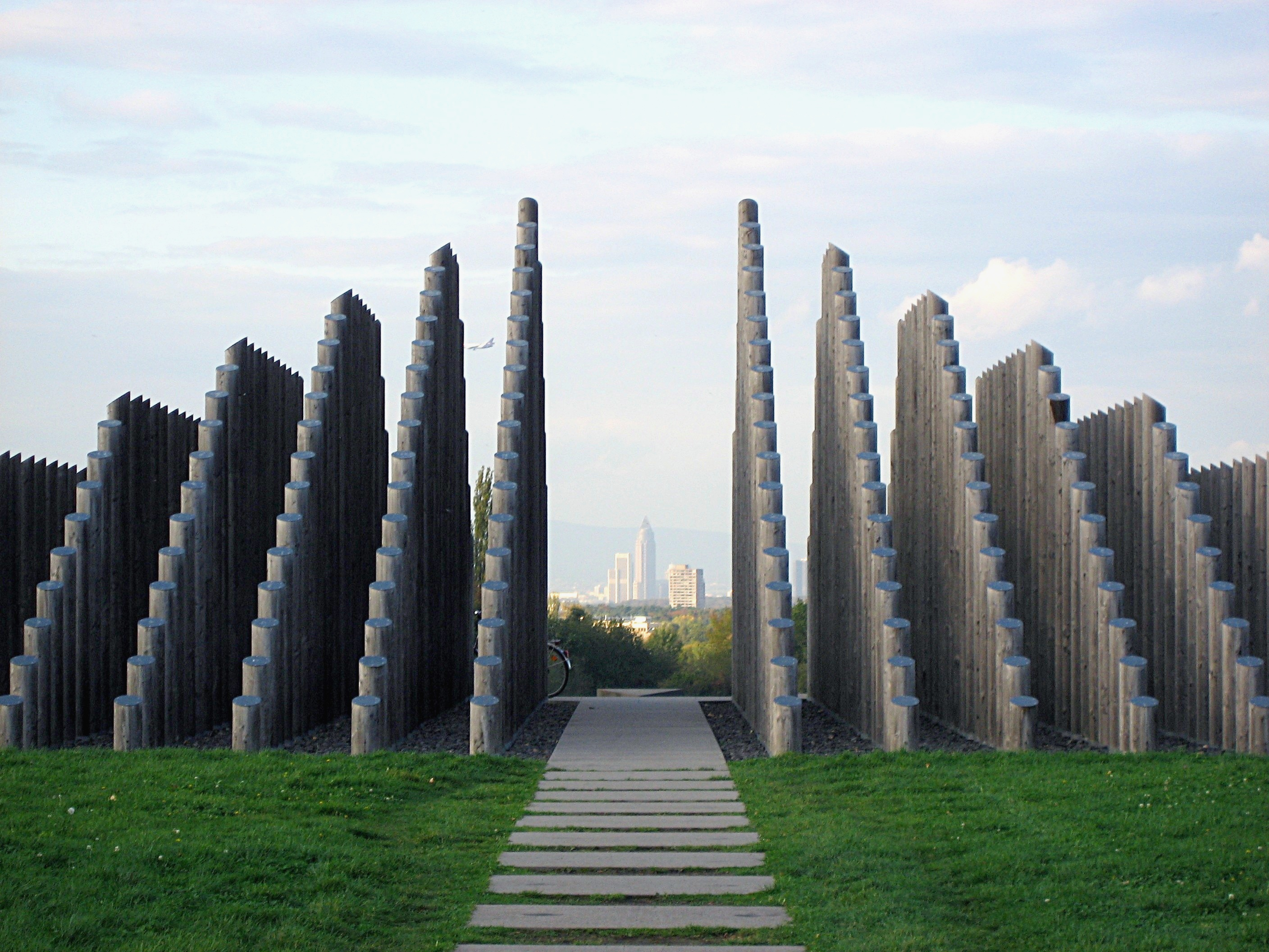 Sicht auf den Messeturm Frankfurt. Fotografiert nahe "Gut Neuhof".